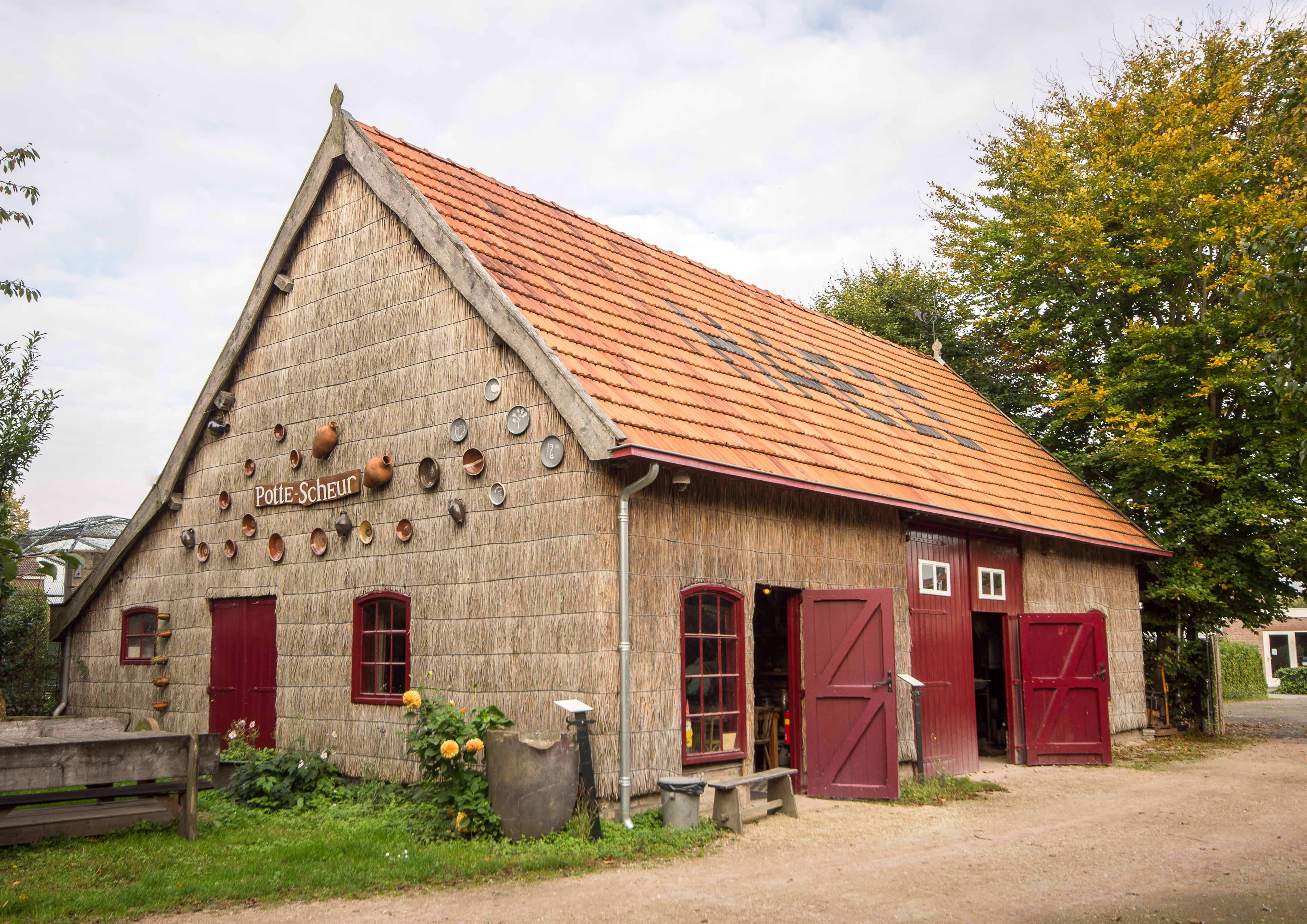 Limburgs Openluchtmuseum Eynderhoof te Nederweert, gebouw "Haeze". Hierin heeft de pottenbakker zijn werkplaats. Het achterste gedeelte dient als opslag van motoren